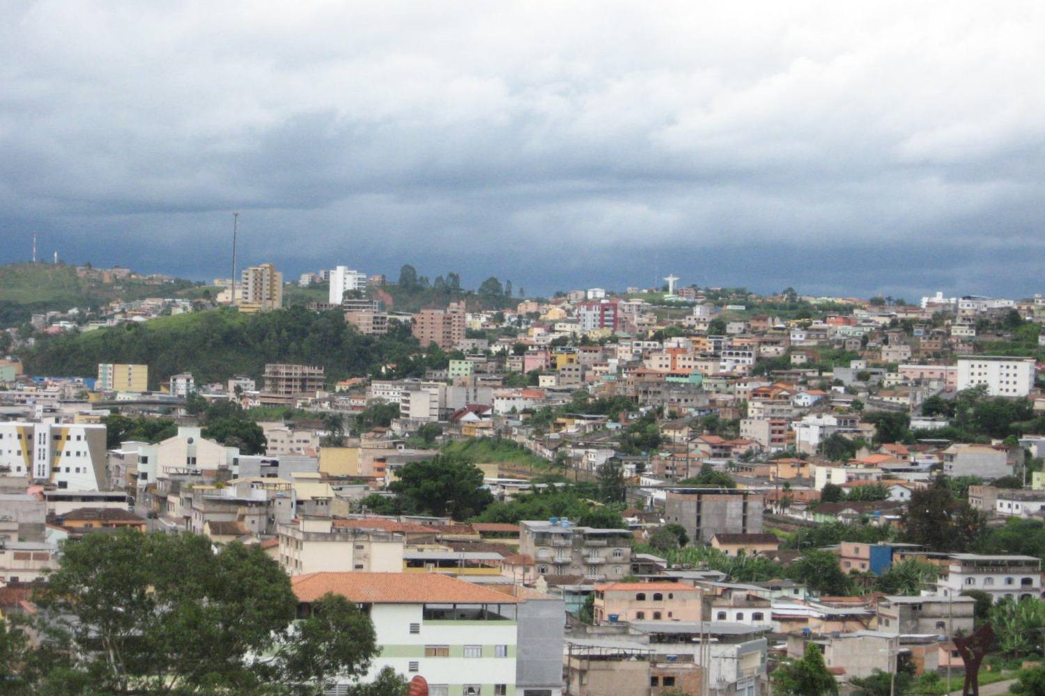 Vista da cidade mineira de Conselheiro Lafaiete.